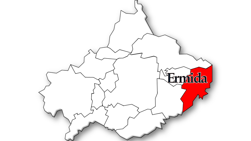 População